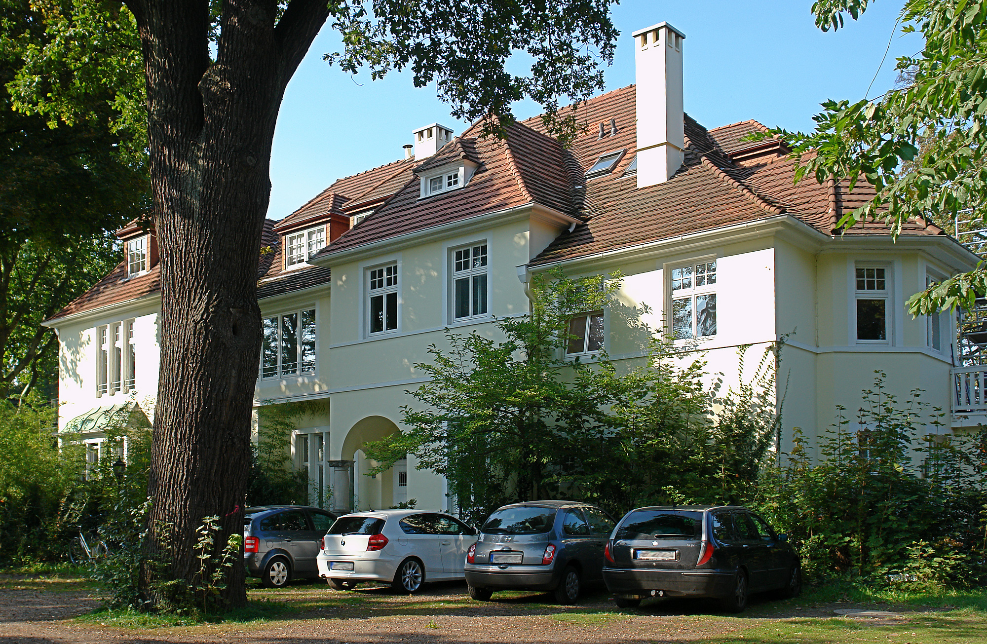 Landhaus Waldthausen in Bremen, Mühlenfeldstraße 49.Das abgebildete Objekt ist ein geschütztes Kulturdenkmal in der Freien Hansestadt Bremen, mit der Nr. 0935 beim Landesamt für Denkmalpflege registriert.